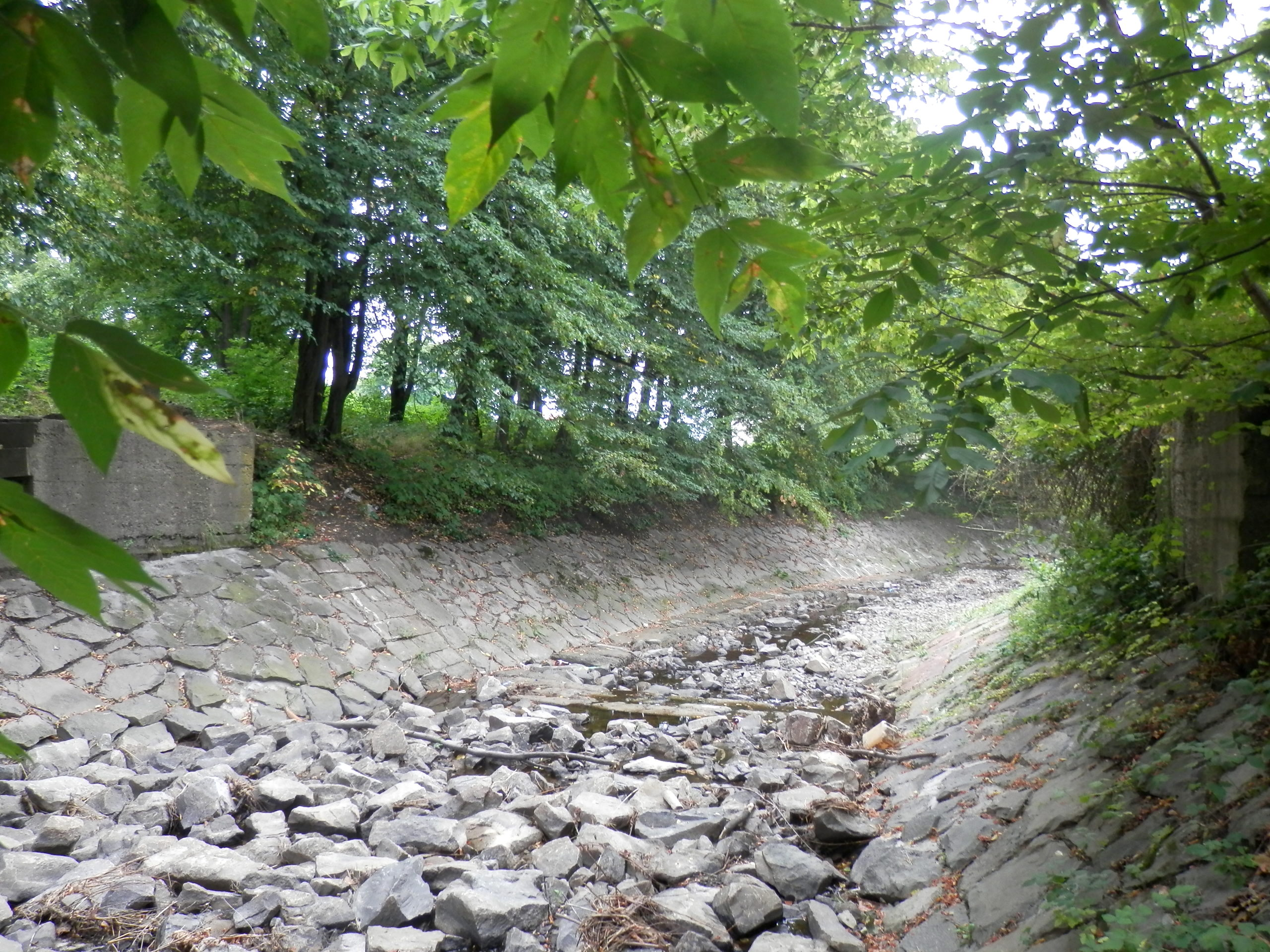 Zvyšky úzkorozchodnej železničky, ktorá viedla cez most ponad Soľný potok. Po železničke sa do skladov, nazývaných komore prevážala vyťažená soľ, Doba vzniku 19.st. Objekt je vedený ako kultúrna a historická pamiatka Mesto Prešov, mestská časť Solivar.